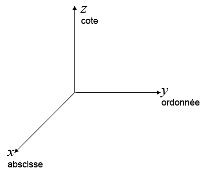 Identification des axes cartésiens dans un espace tridimensionnel (R^3).